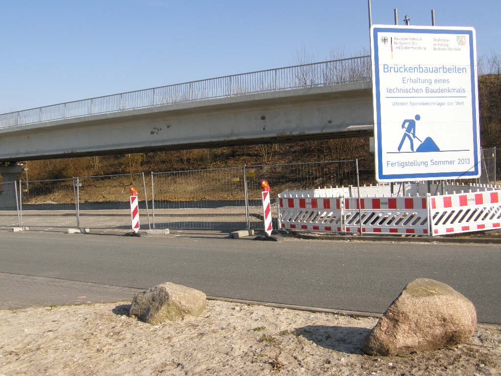 Spannbetonbrücke A2 Rastplatz Vellern (zwischen Beckum und Oelde, Fahrtrichtung Hannover) Es handelt sich um die älteste Autobahn-Spannbetonbrücke der Welt, ehemals Überführung Weg Hesseler